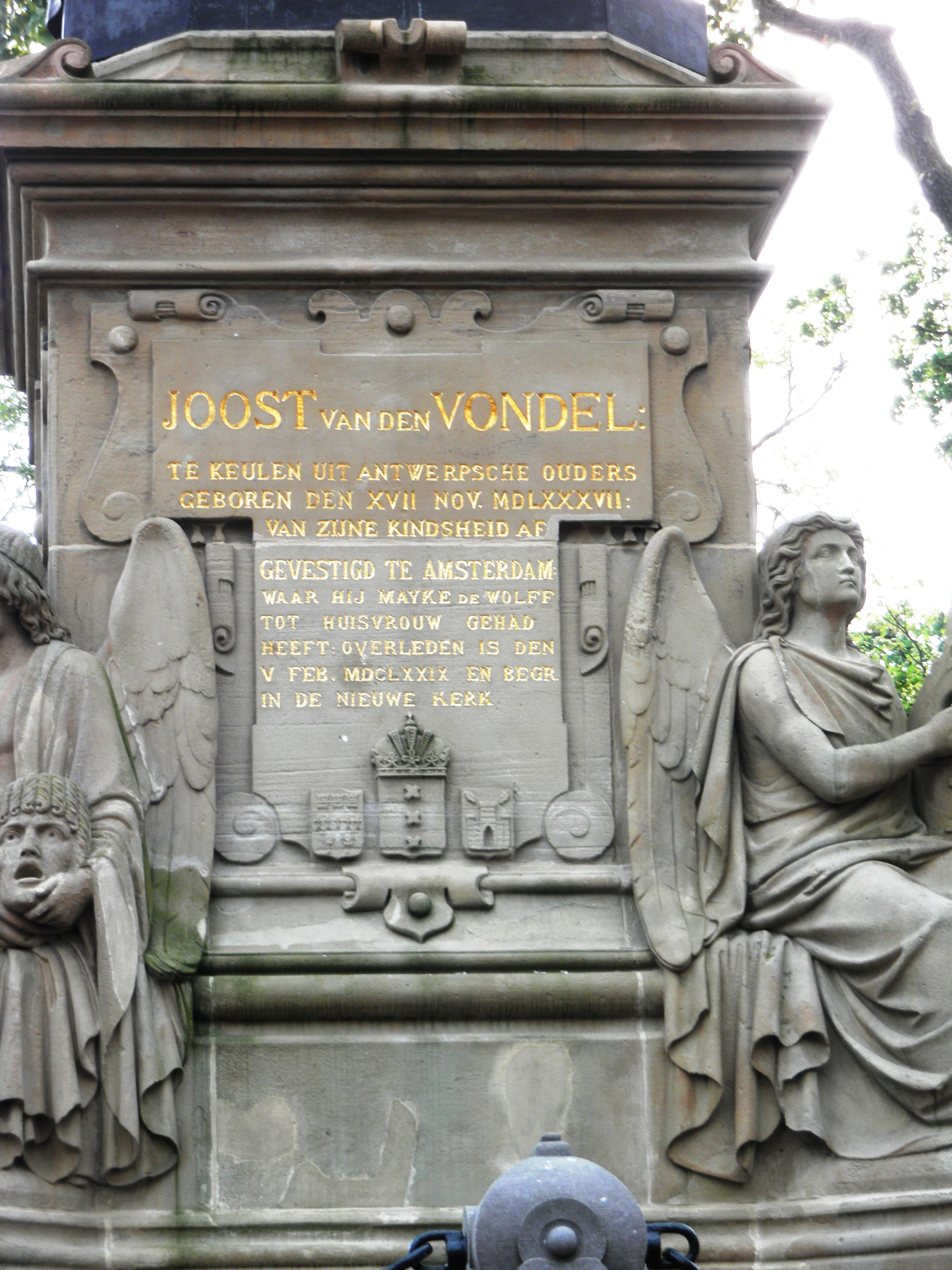 אמסטרדם